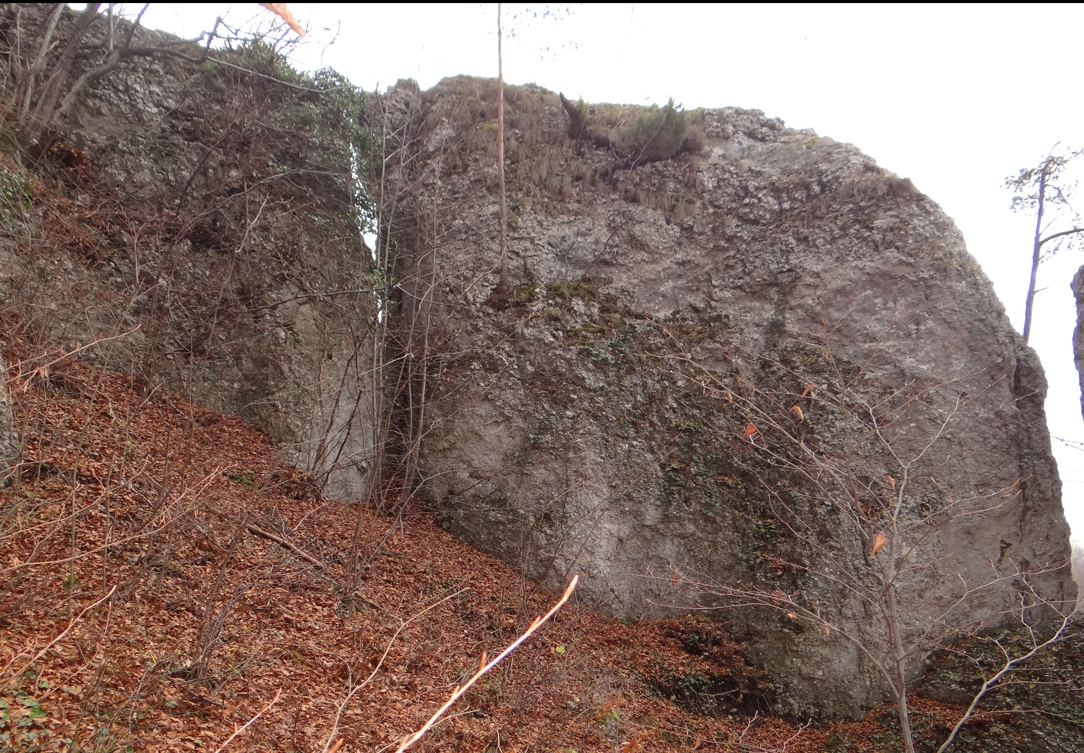 Szeroka Turnia w Dolinie Kobylańskiej